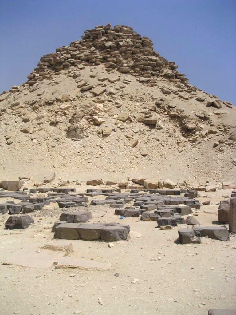 Vue de la grande cour du temple funéraire de la pyramide d'Ouserkaf - Saqqarah - Ve dynastie égyptienne